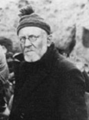 La Patagonia Rebelde, 1974. Pepe Soriano (el alemán Schultz)